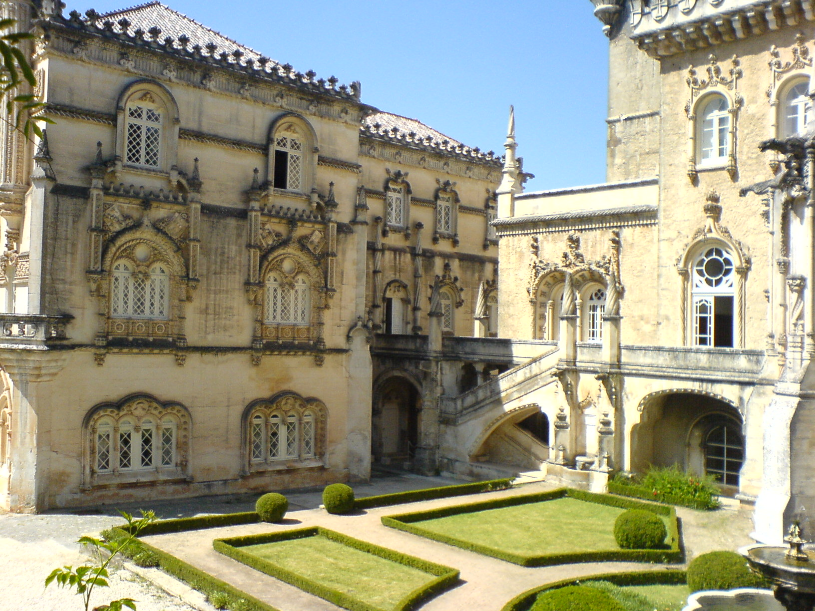 Buçaco 6